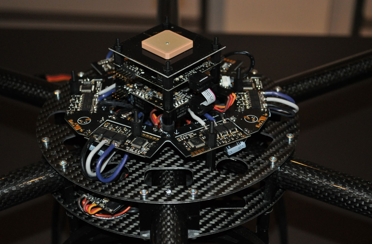 Auf dem Bild von rc-quadrocopter.de ist die Steuereinheit eines Multicopter / Quadrocopter System zu sehen. Im oberen Bereich finden Sie das GPS Modul, darunter das Navi Board gefolgt von der FlightControl mit den eingebauten Gyros zur Stabilisierung. Im äußeren Kranz erkennt man die Brushless Motorregler.